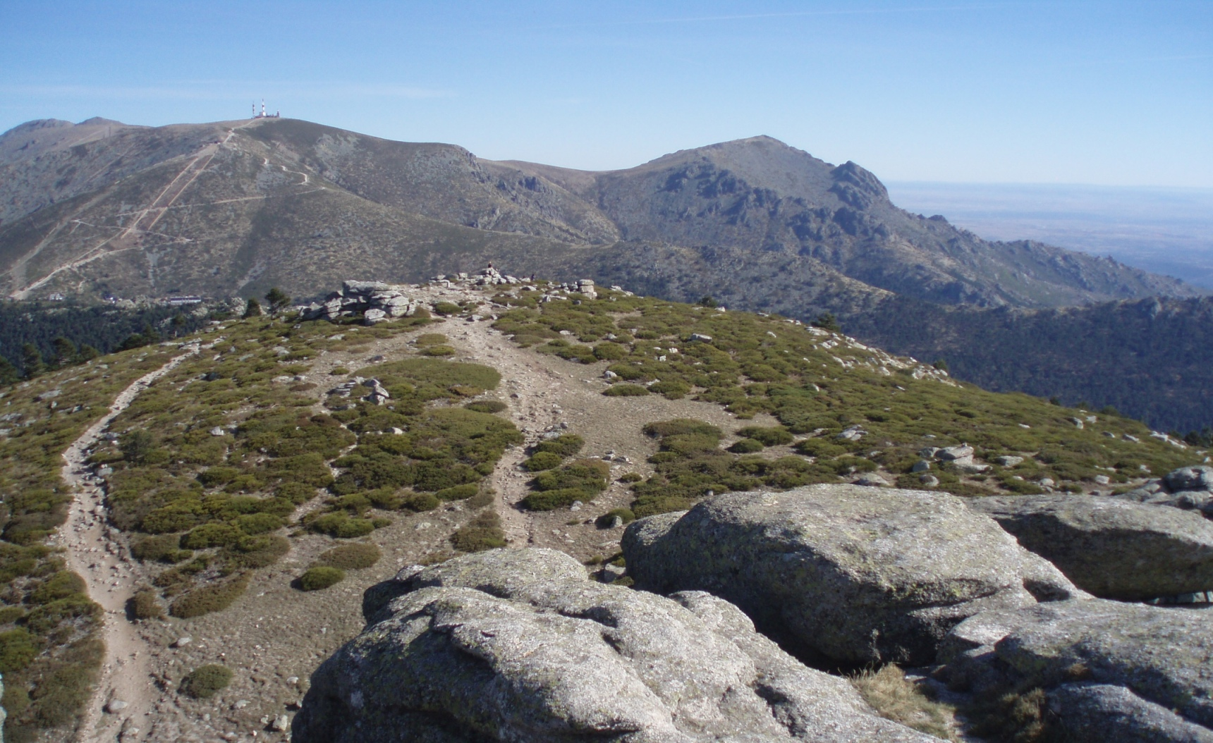 Vista hacia el este desde la cima de Siete Picos (Sierra de Guadarrama, España). La fotografía fue tomada el 11 de noviembre de 2007, época en que las nevadas en la Sierra de Guadarrama son aún ocasionales. En la imagen se aprecian, de izquierda a derecha, las montañas de las Cabezas de Hierro, la Bola del Mundo, y La Maliciosa. Estas dos últimas montañas están separadas por el collado del Piornal, cuya silueta se ve perfectamente en la fotografía. A la derecha de la cima de La Maliciosa se ve el Peñotillo, una peña que parece ser la cima si se observa desde el valle de la Barranca. La loma que se ve en la mitad inferior de la imagen es la que está junto al pico más oriental y alto de los Siete Picos, lugar desde donde se ha tomado la fotografía. La llanura que se extiende a la derecha de La Maliciosa corresponde a la zona noroeste de la Comunidad de Madrid.